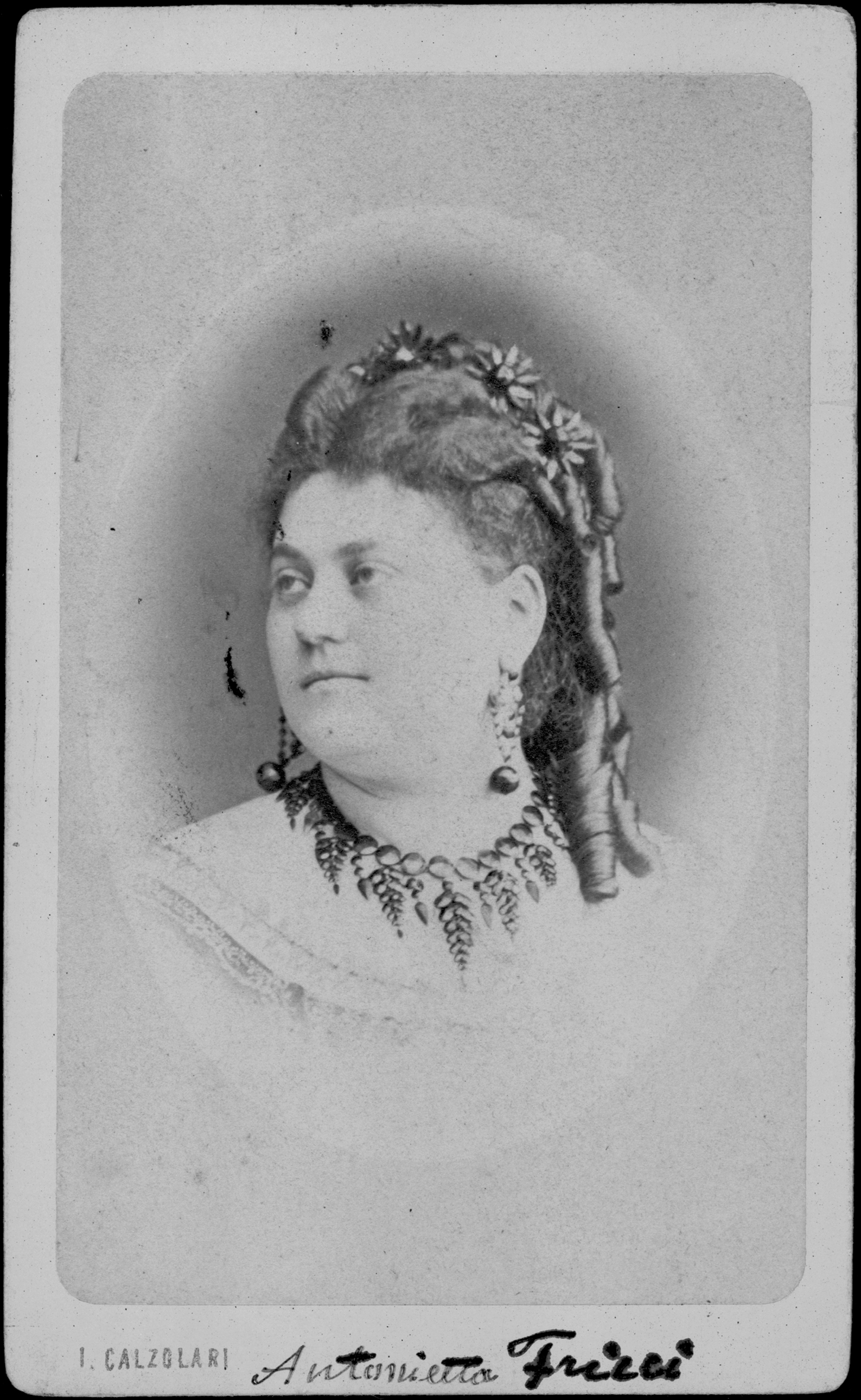 Antonietta Fricci (1840 - 1912)